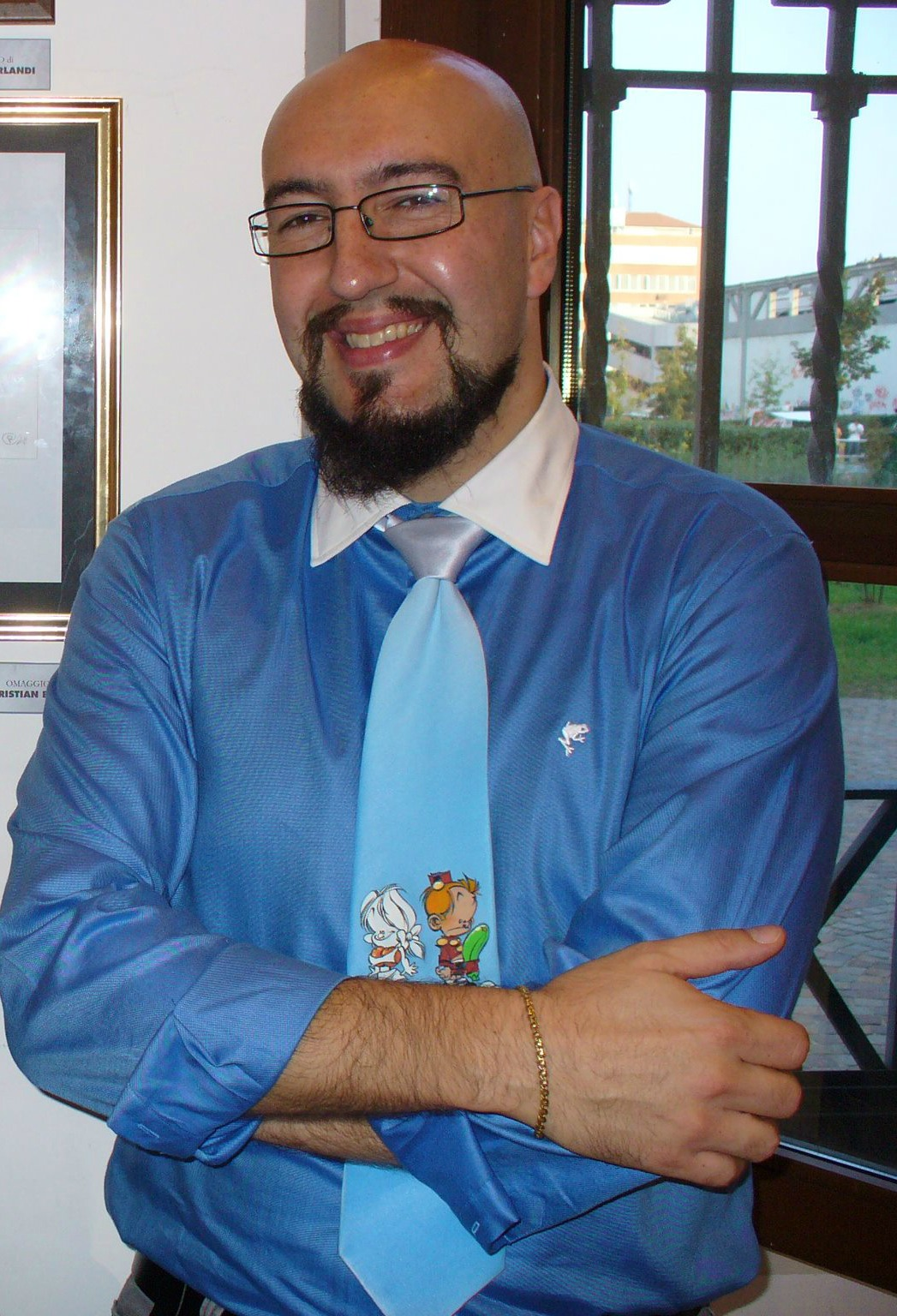 Mirko Perniola, autore e sceneggiatore per Sergio Bonelli Editore